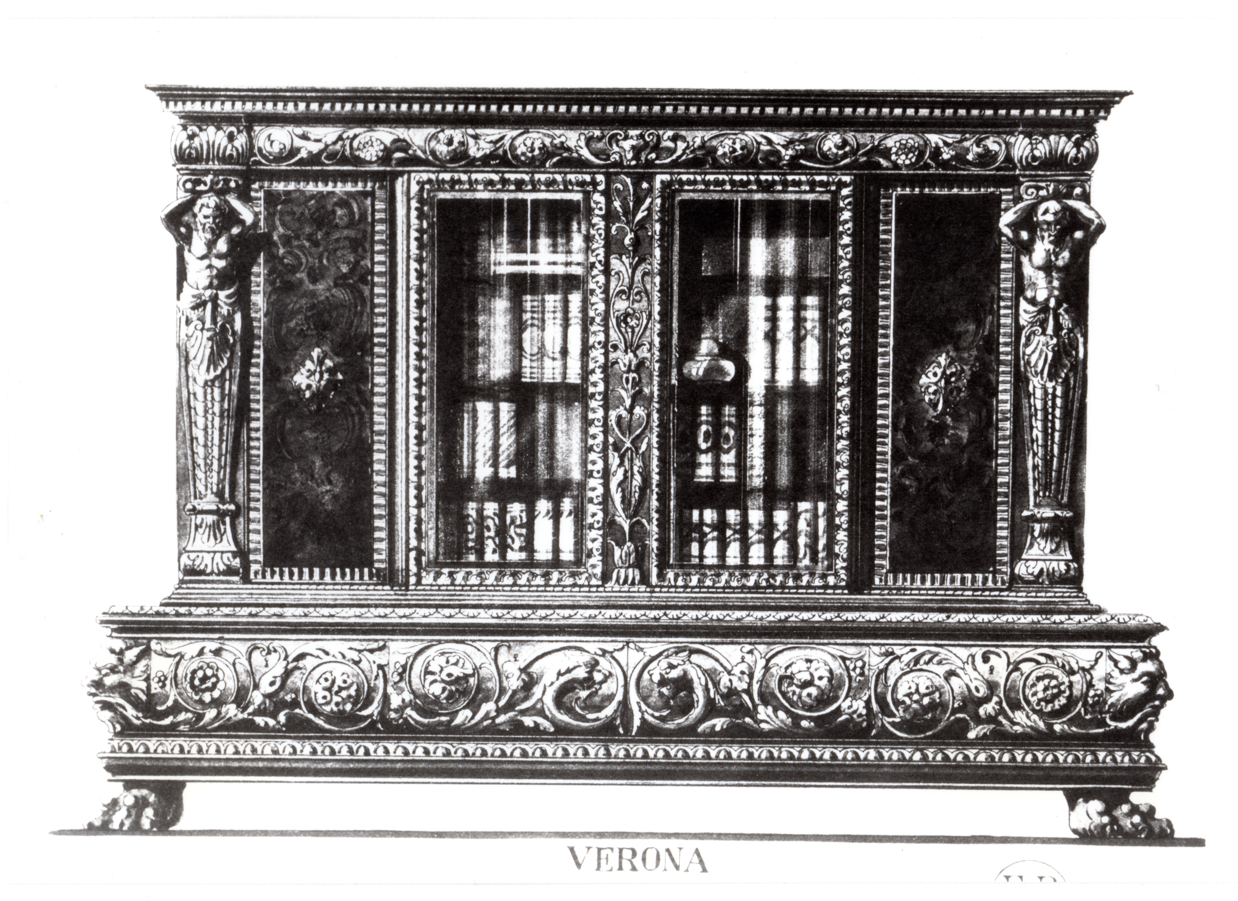 Herrenzimmerschrank „Verona“ Italienisch Renaissance, 1930er Jahre, Katalogabbildung Möbelfabriken Franz Pollmann, Steinheim/Westfalen